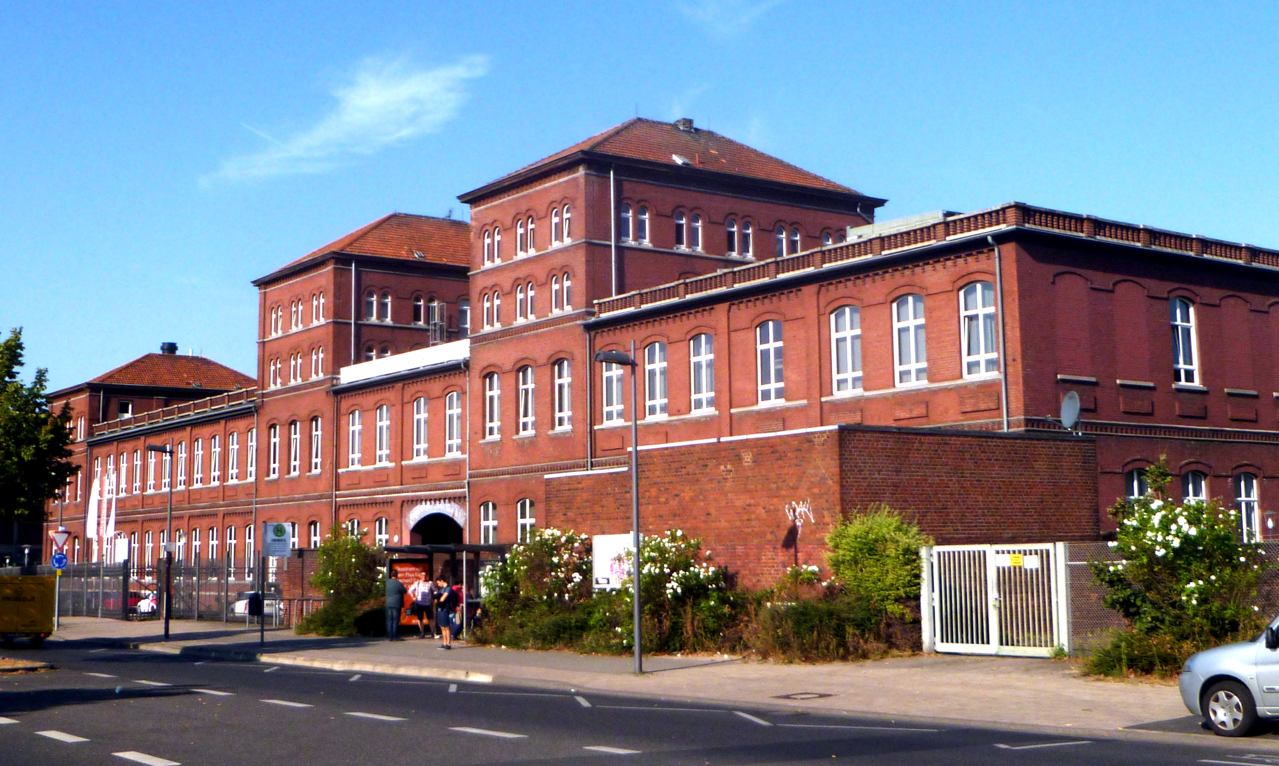 Verwaltungsgebäude in Rothe Erde, früher: Aachener Hütten-Actien-Verein-Rothe Erde, dann Engleberet/Uniroyal, jetzt Actimonda BKK